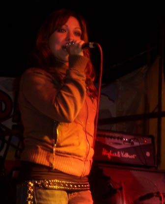 Sorkun durante un concierto en las Kontrafiestas de Vallecas en septiembre de 2006.